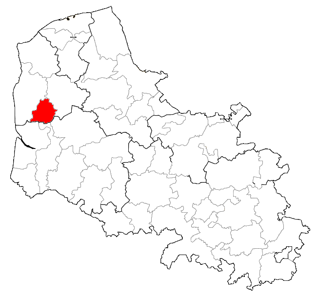 CCSamer dans le 62.